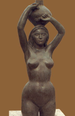 Figura de la Muchacha del Cantaro, fundida en bronce y con la que Antonio Cano obtuvo la segunda medalla en el concurso naciona de Bellas Artes en la modalidad de escultura en el año 1950. Esta obra se encuentra en el museo de arte contemporaneo de Madrid, y otra copia está en la fundición Capa. Madrid